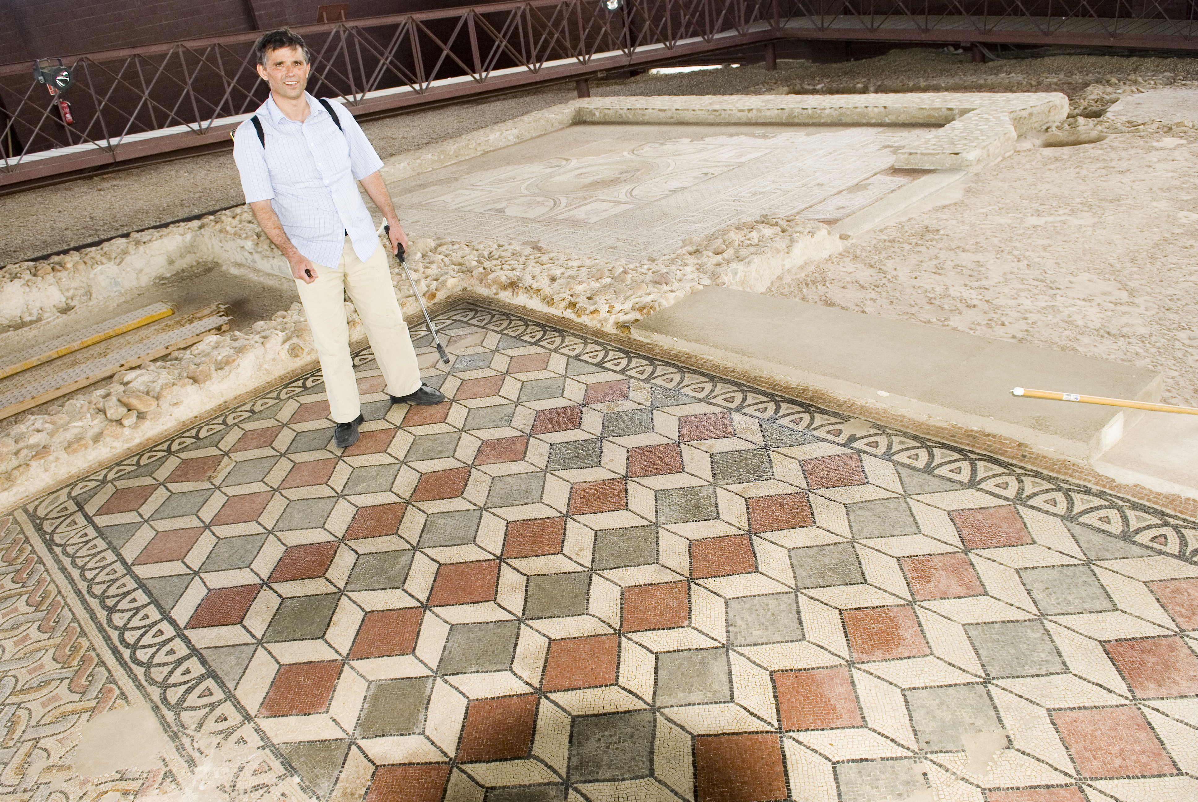 El descubridor de la villa romana de Carranque sobre los mosaicos que descubrió